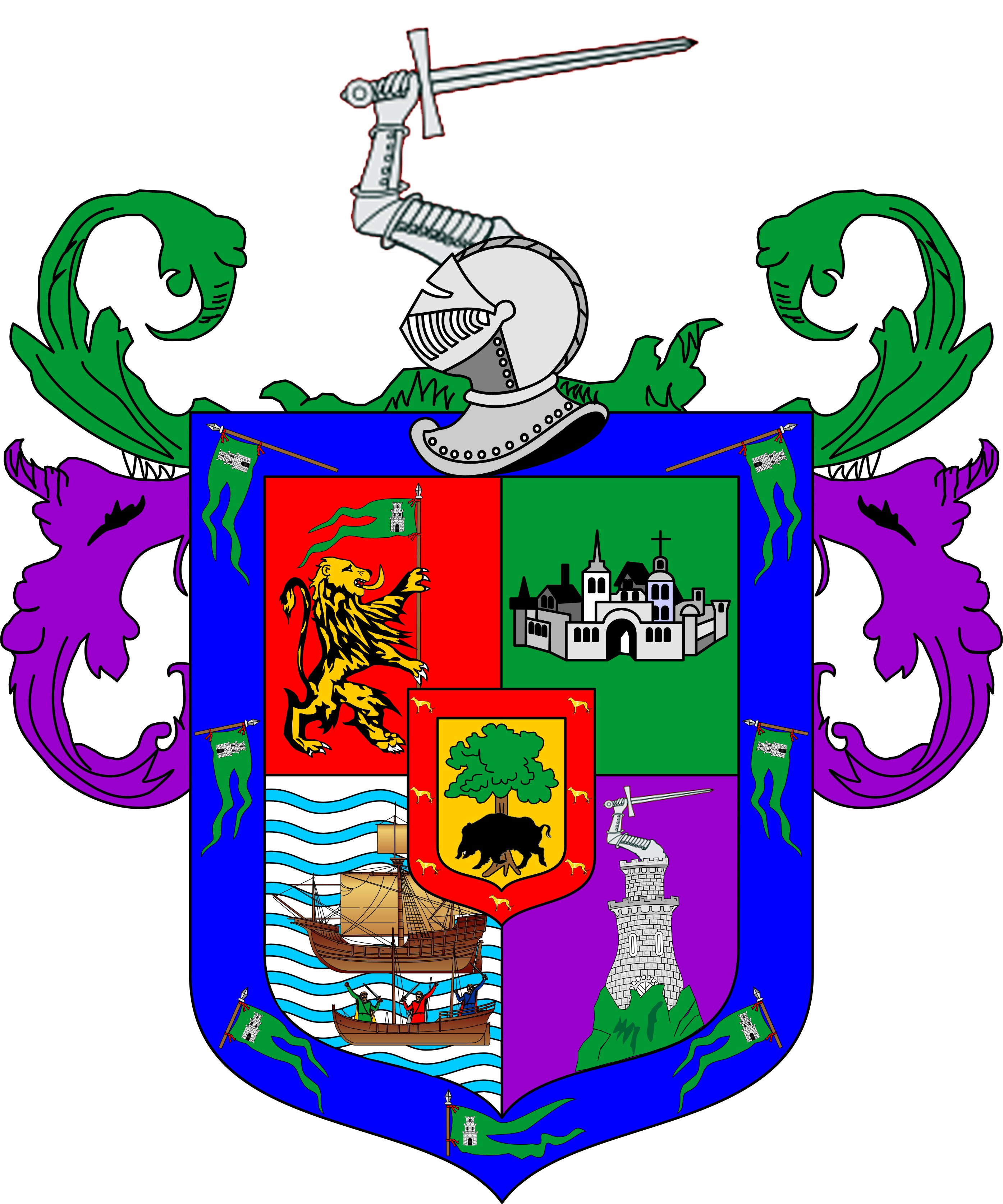 Escudo de Juan Porcel de Padilla Vecino de Puerto Viejo, Alcalde Ordinario de Santiago de la Culata, Fundador de Nueva Jerez de la Frontera 2.XII.1568. Archivo General de Indias,QUITO,211,L.1,F.201R .Consultado, diseñado, descifrado y compartido por el historiador Jodison Javier García Alcívar.